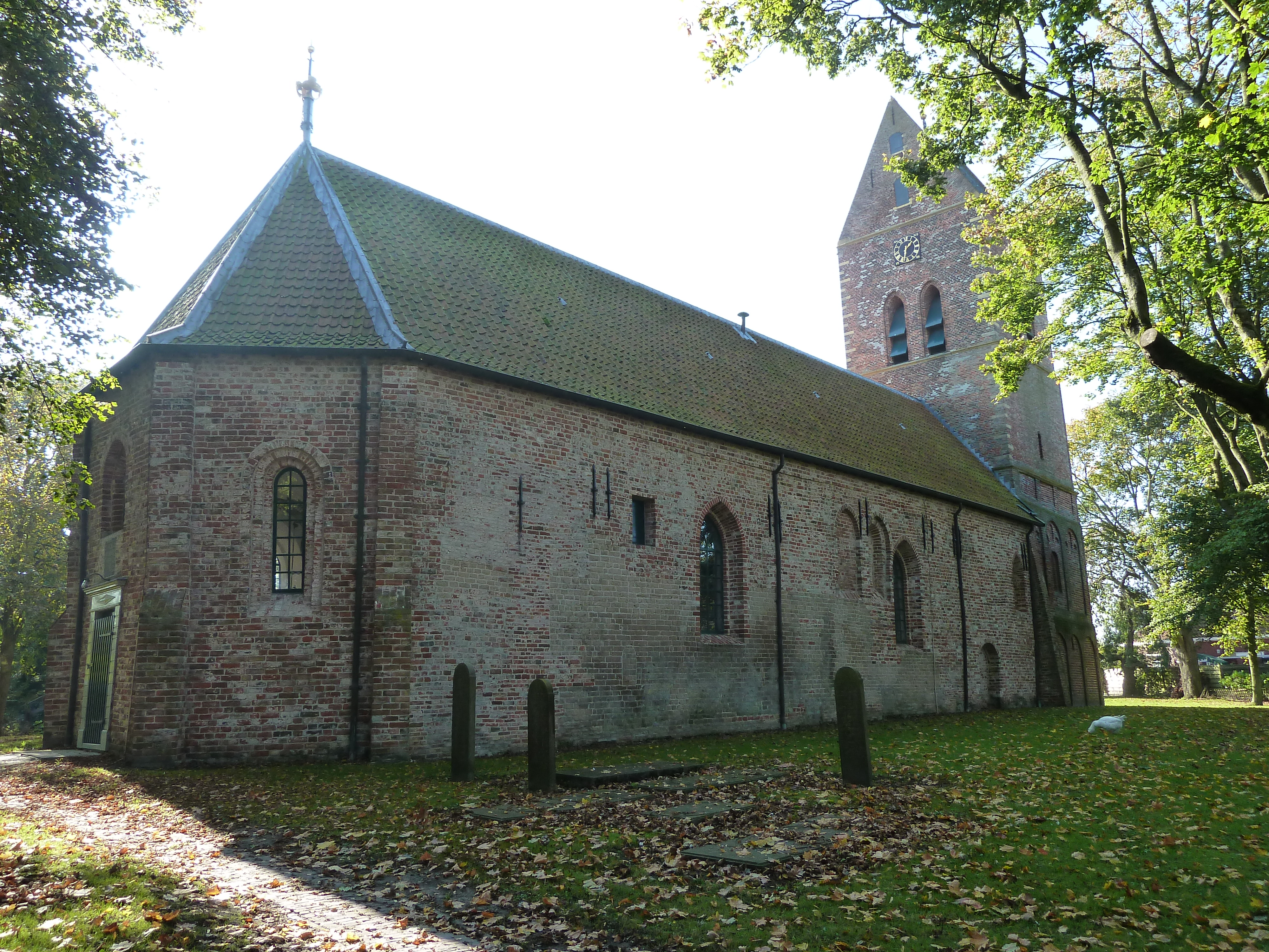 Hervormde kerk van Godlinze.